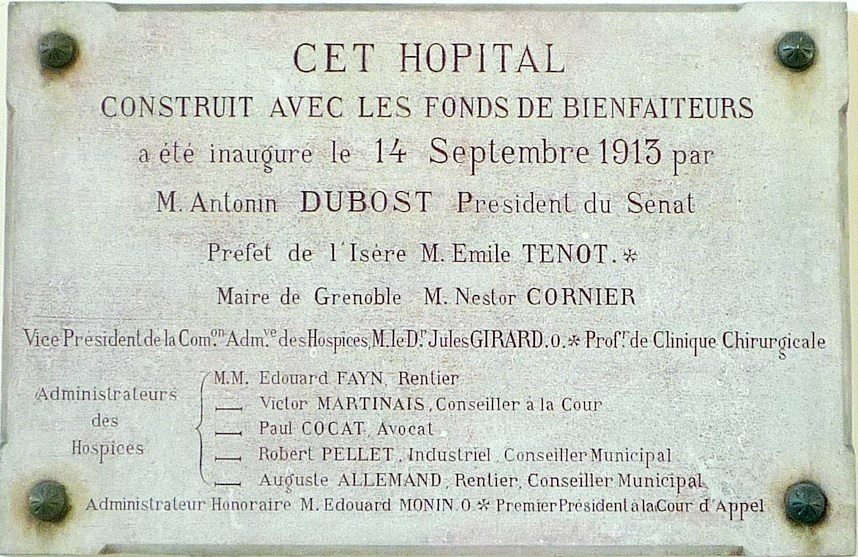 Plaque d'inauguration de l'hôpital civil de Grenoble (sept. 1913)